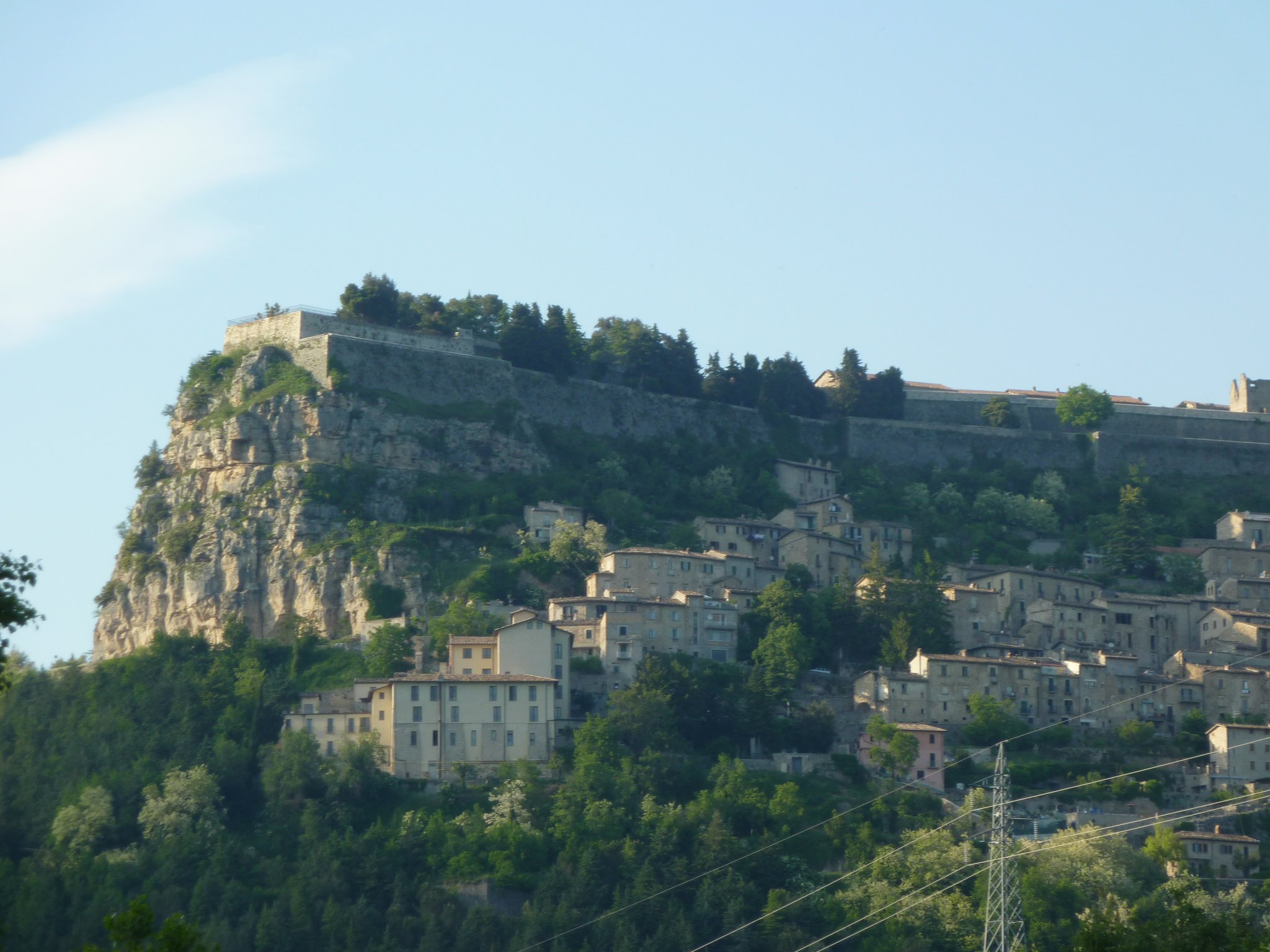 Civitella del Tronto: fortezza